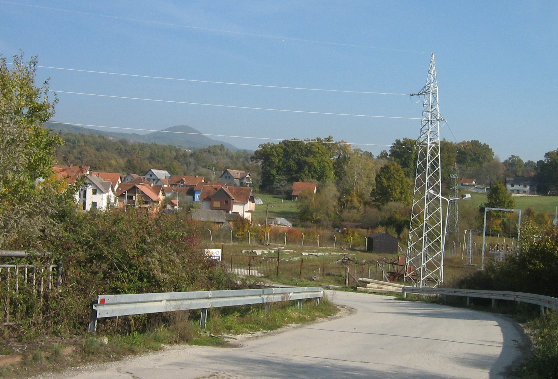 Улаз у Шеврљуге.